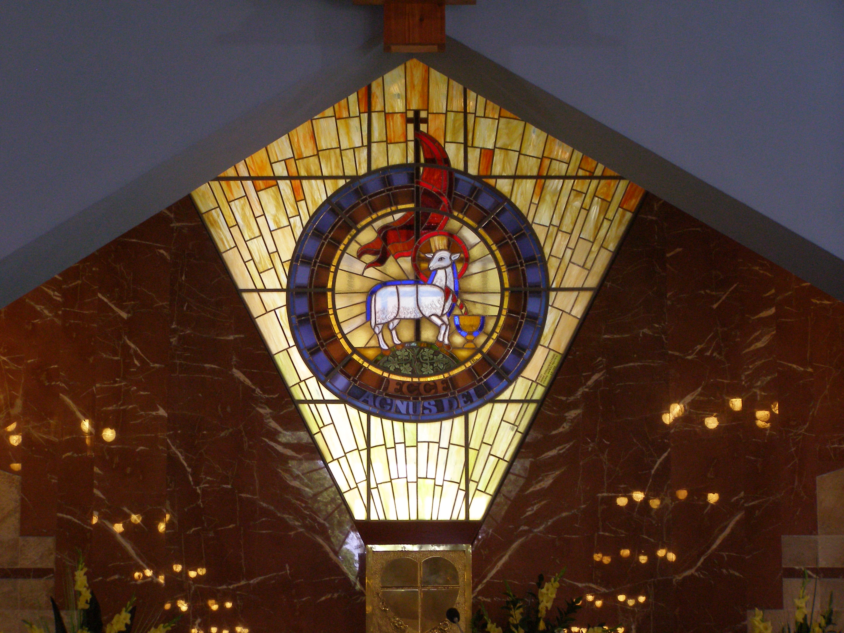 Okno witrażowe nad ołtarzem kościoła Matki Bożej Bolesnej w Milanówku